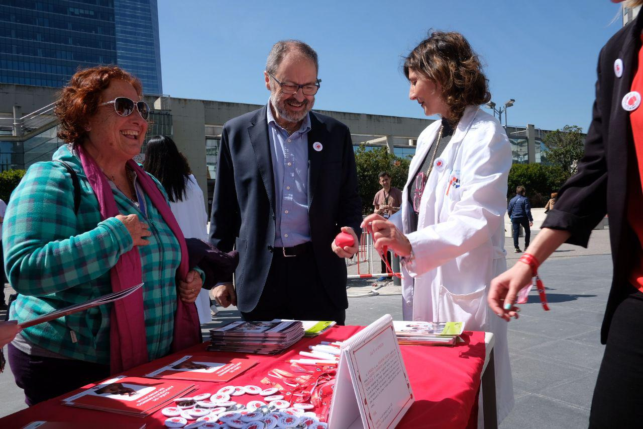 El delegado de Salud, Seguridad y Emergencias, Javier Barbero, ha asistido esta mañana al Hospital Universitario La Paz, donde se han realizado diversos actos con motivo del Día Mundial de la Hemofilia, que se celebra hoy 17 de abril.